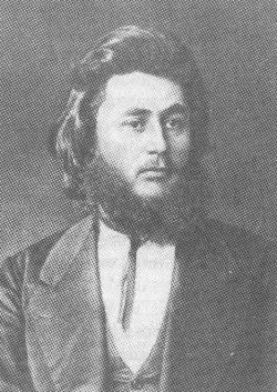 Michail Nikolaevic Trigoni (1850-1917)